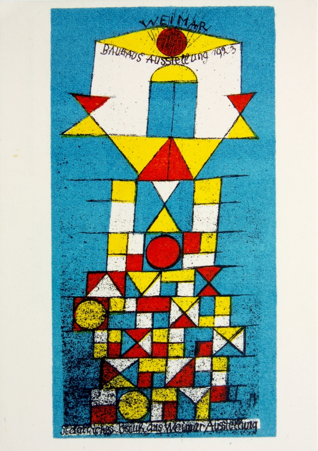 Ausstellungspostkarte anlässlich der Bauhausausstellung in Weimar im Jahr 1923